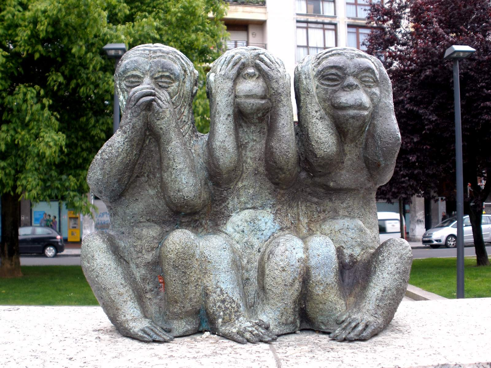 Parque de Santurtzi (Santurtzi, Bizkaia)